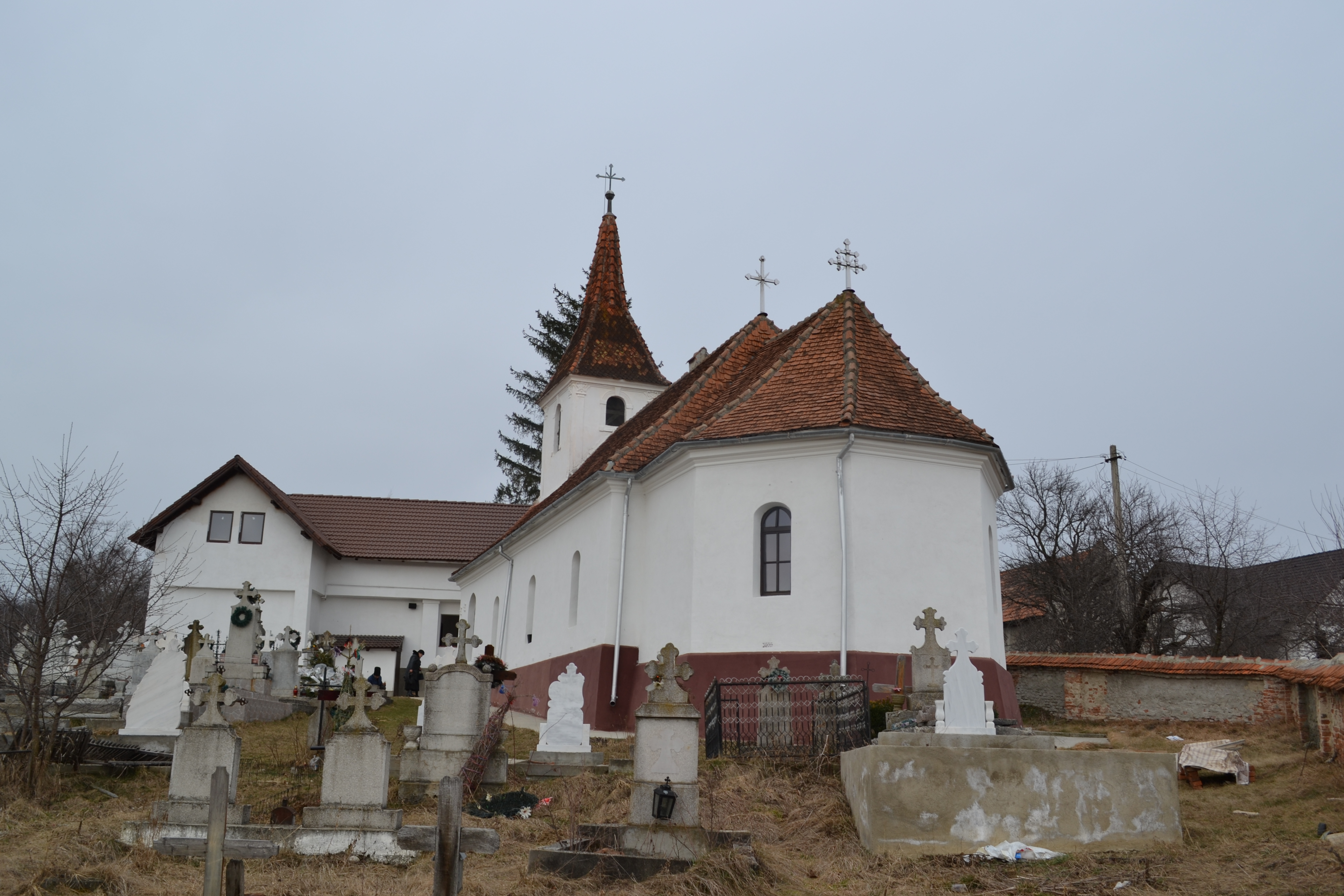 Biserica Sfânta Cuvioasa Paraschiva Sohodol